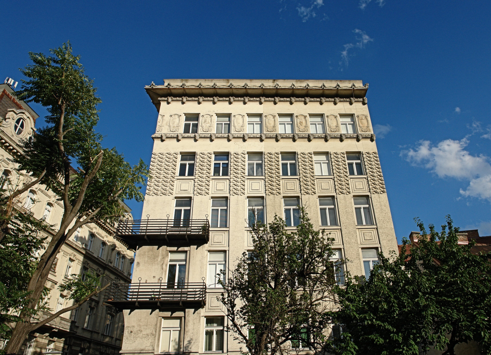 Steggasse Tenement House (Vienna, Austria)